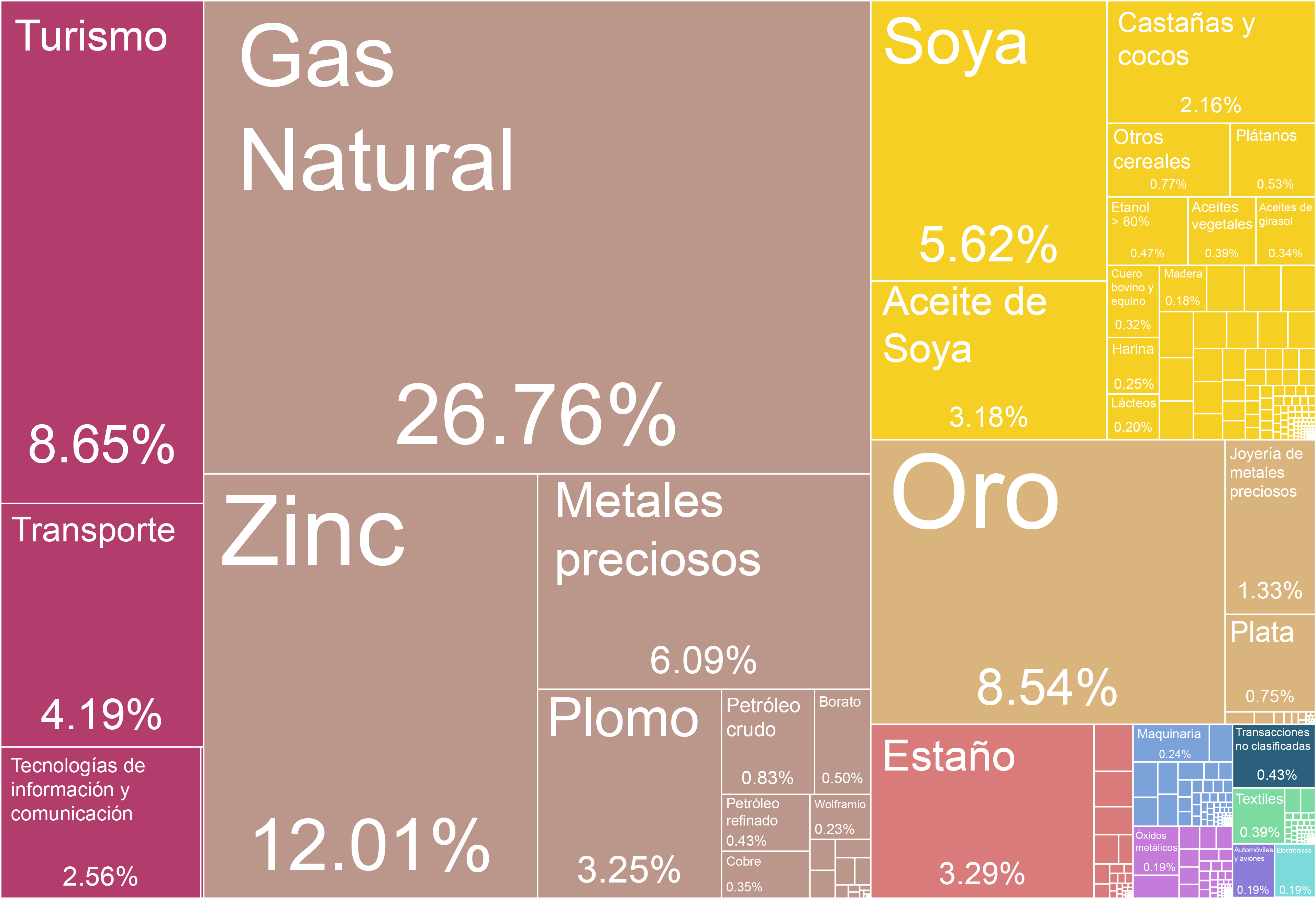 Representación gráfica de los productos de exportación del país en 11 categorías codificadas por color. Cada recuadro de color representa un producto y su tamaño es proporcional a la participación que ese producto representa dentro del total de las exportaciones del país.